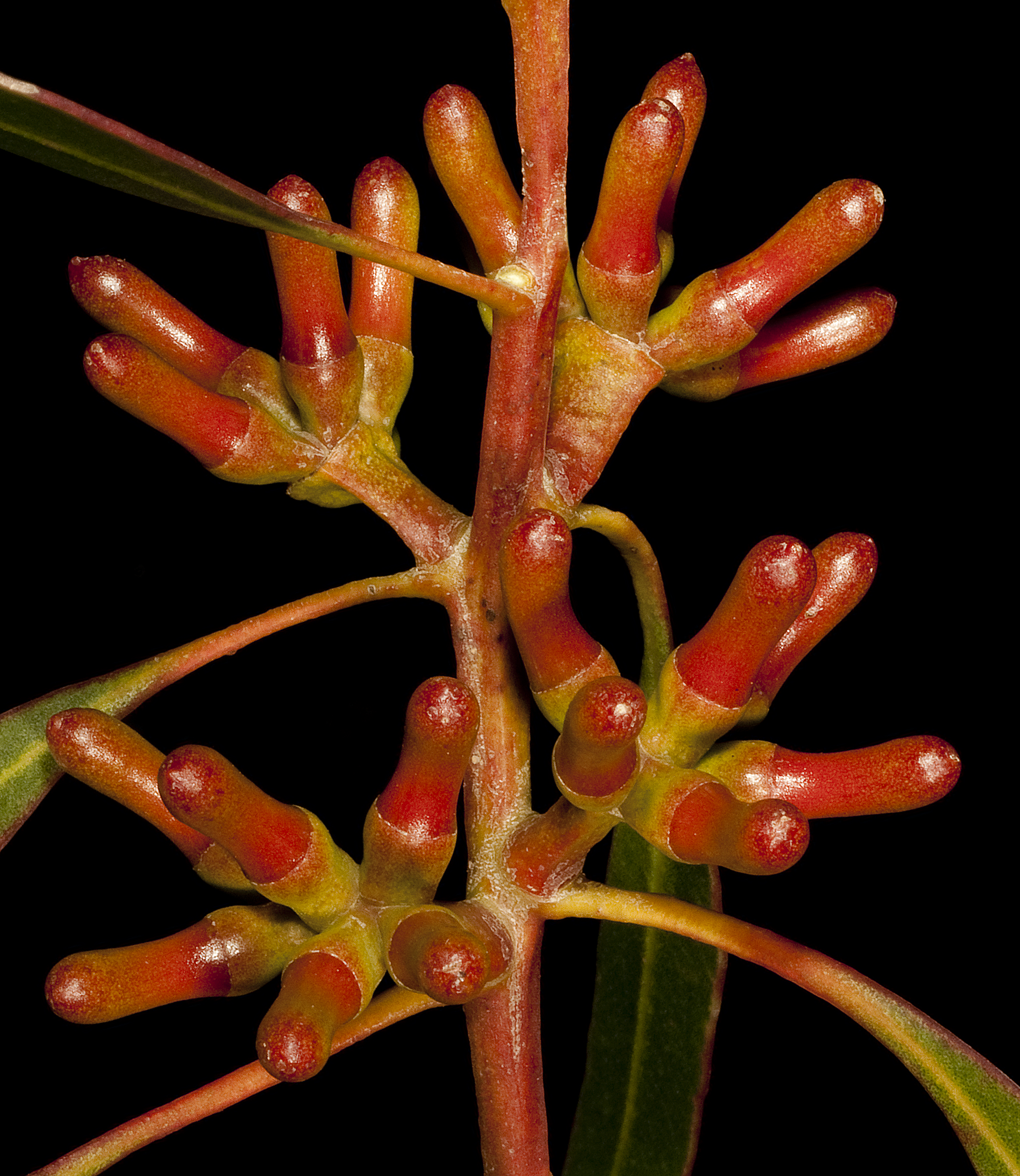 KRT4548